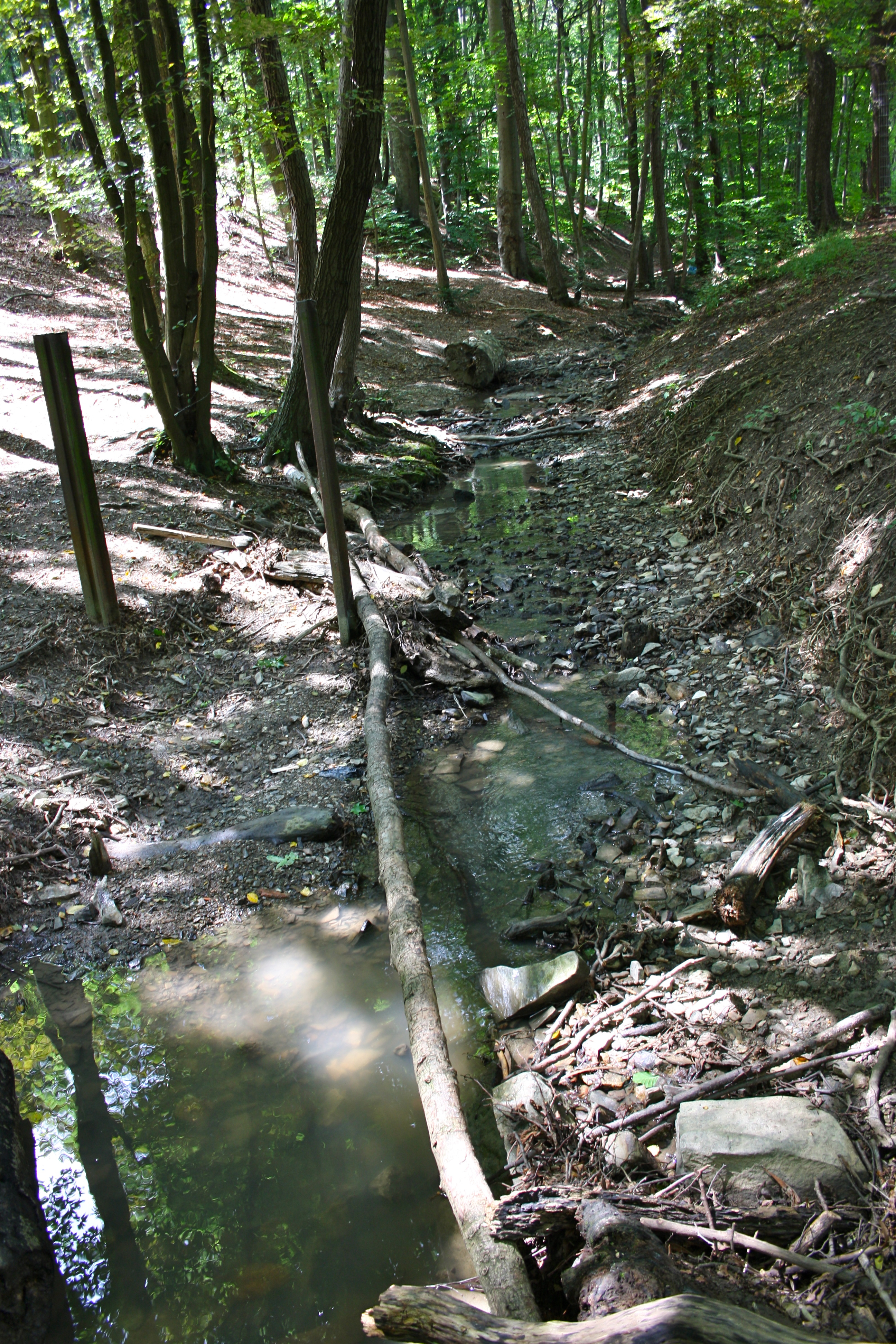 Die Als (auch Alserbach, Dornbach) im Schwarzenbergpark unmittelbar südwestlich der Schwarzenbergallee.